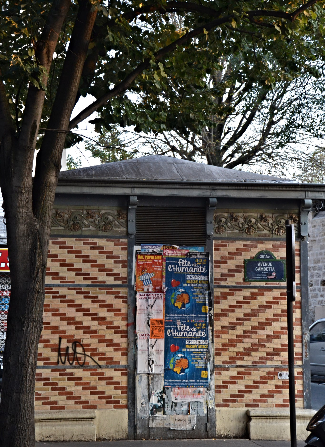 avenue Gambetta. Transformateur électrique des années 1920–1930, France